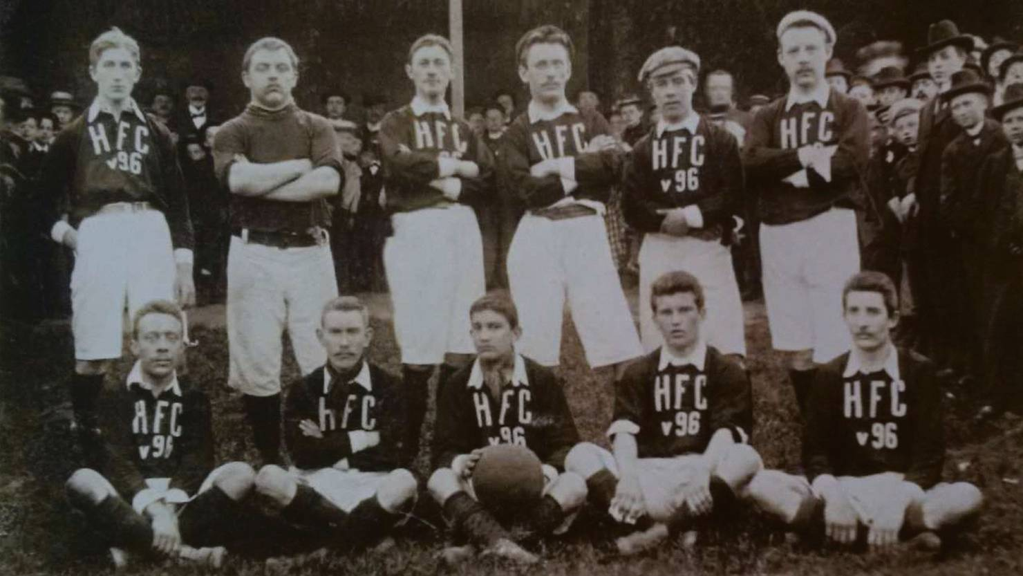 Ein Mannschaftsfoto der Fußballer vom Hannoverschen Fußball-Club von 1896, dem späteren Verein Hannover 96, aufgenommen am 2. Juni 1901 auf dem Spielplatz auf der Bult in Hannover. Das Foto ist die einzige bekannte Hannover-Fotografie mit dem ersten Ausländer des Vereins, dem aus Basel stammenden Schweizer Uhrmacher Max Senn, der hier in der Mitte der unteren Reihe sitzt und den Ball hält. Das Lichtbild entstand nach dem Mitgliederentscheid des Vereins, zukünftig nur noch mit einem runden Ball anstelle des zuvor verwendeten ovalen Balles zu spielen, und anlässlich des Spiels HFC v. 1896 gegen Eintracht Braunschweig. Das Spiel endete 2:2 unentschieden. Stehend von links: Karl Ahrens, W. von Roeder, Eberhard Wöppelmann, Rössler, Weber, Jung. Sitzend von links: Franz Namendorff, Friedrich Schlüter, Max Senn, Leussler, Fritz Hoffmann